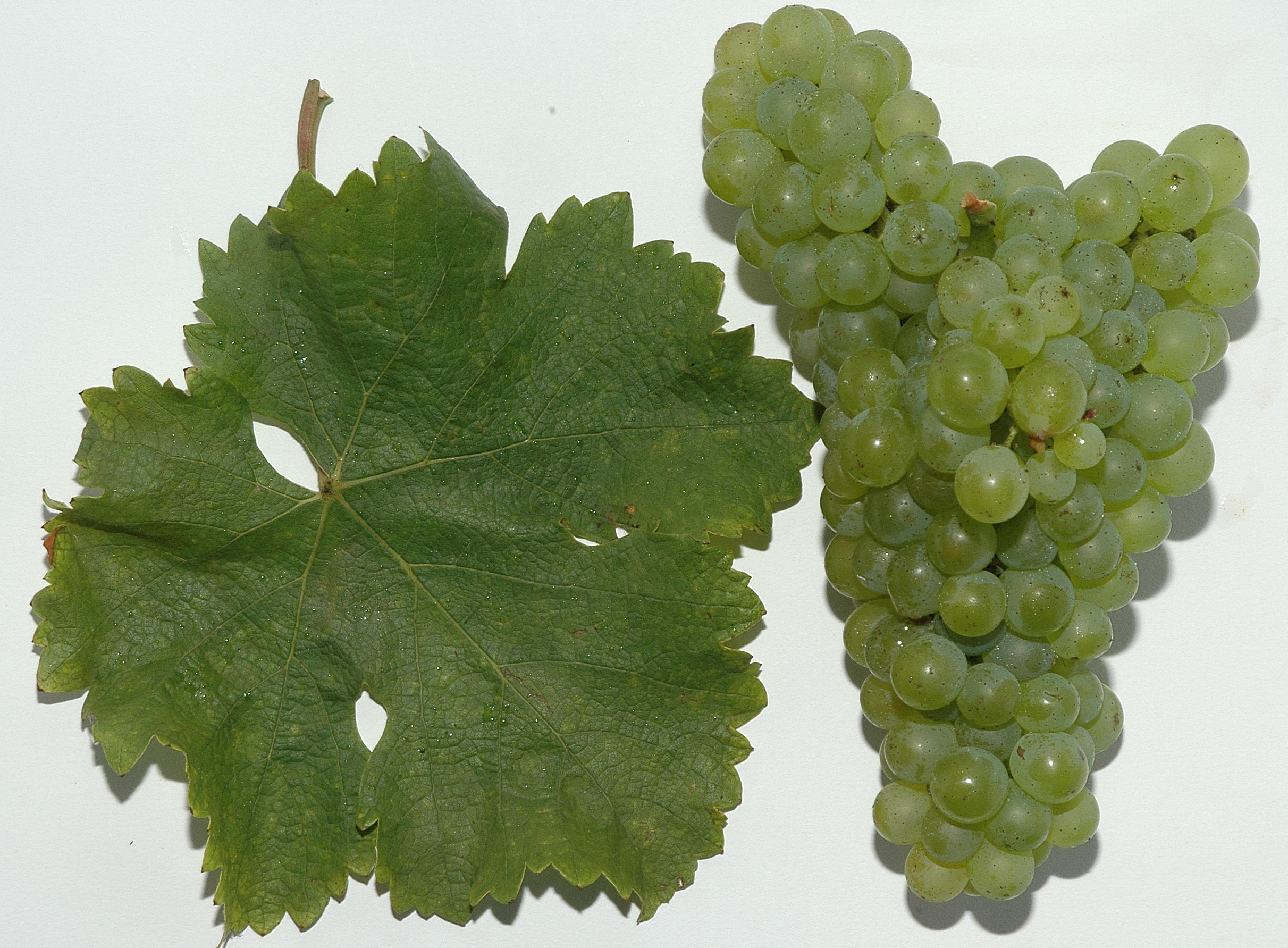 Traube und Blatt der Weißweinsorte Sauvignon blanc